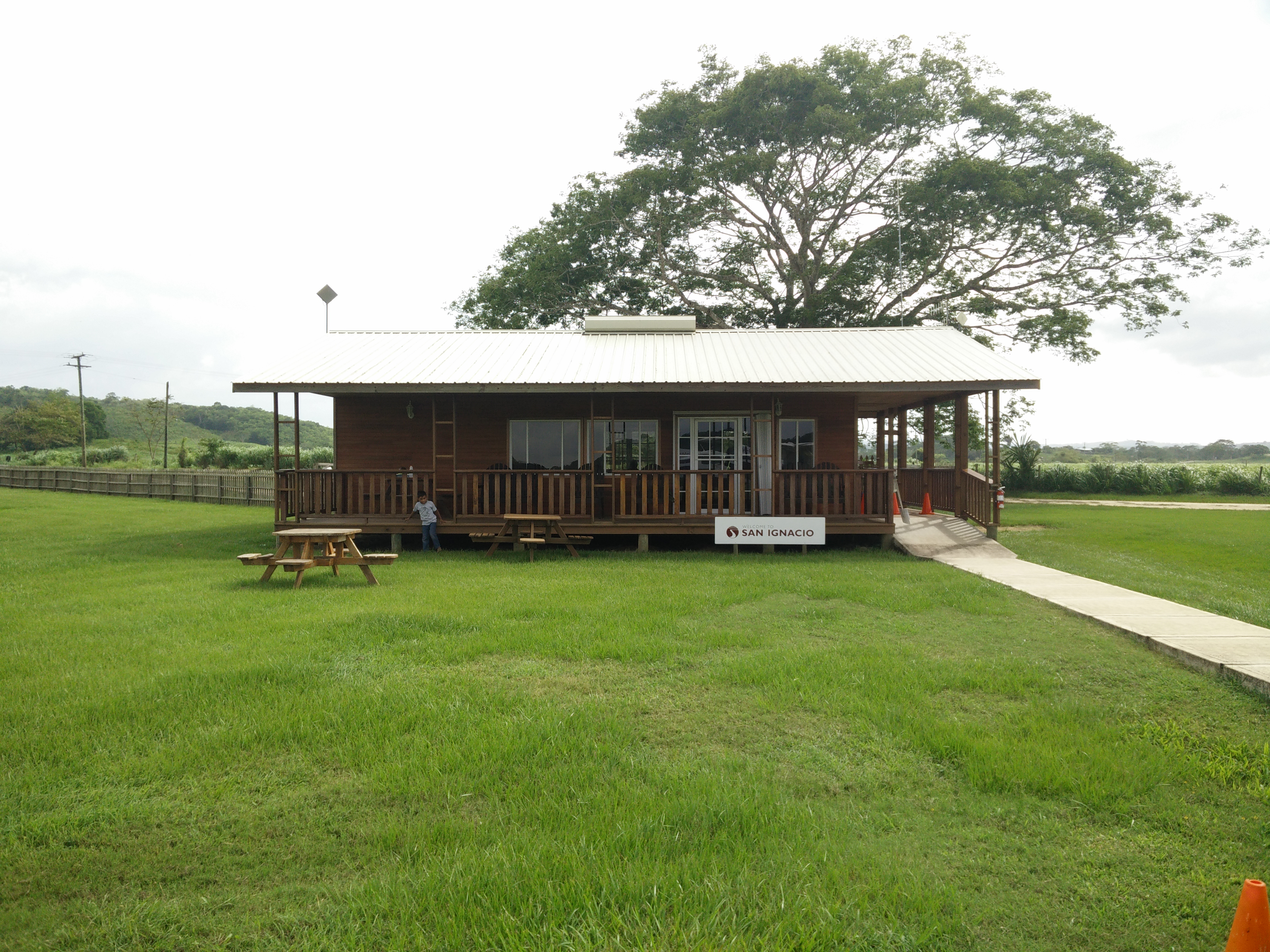 San Ignacio Airstrip "Mayan Flats"